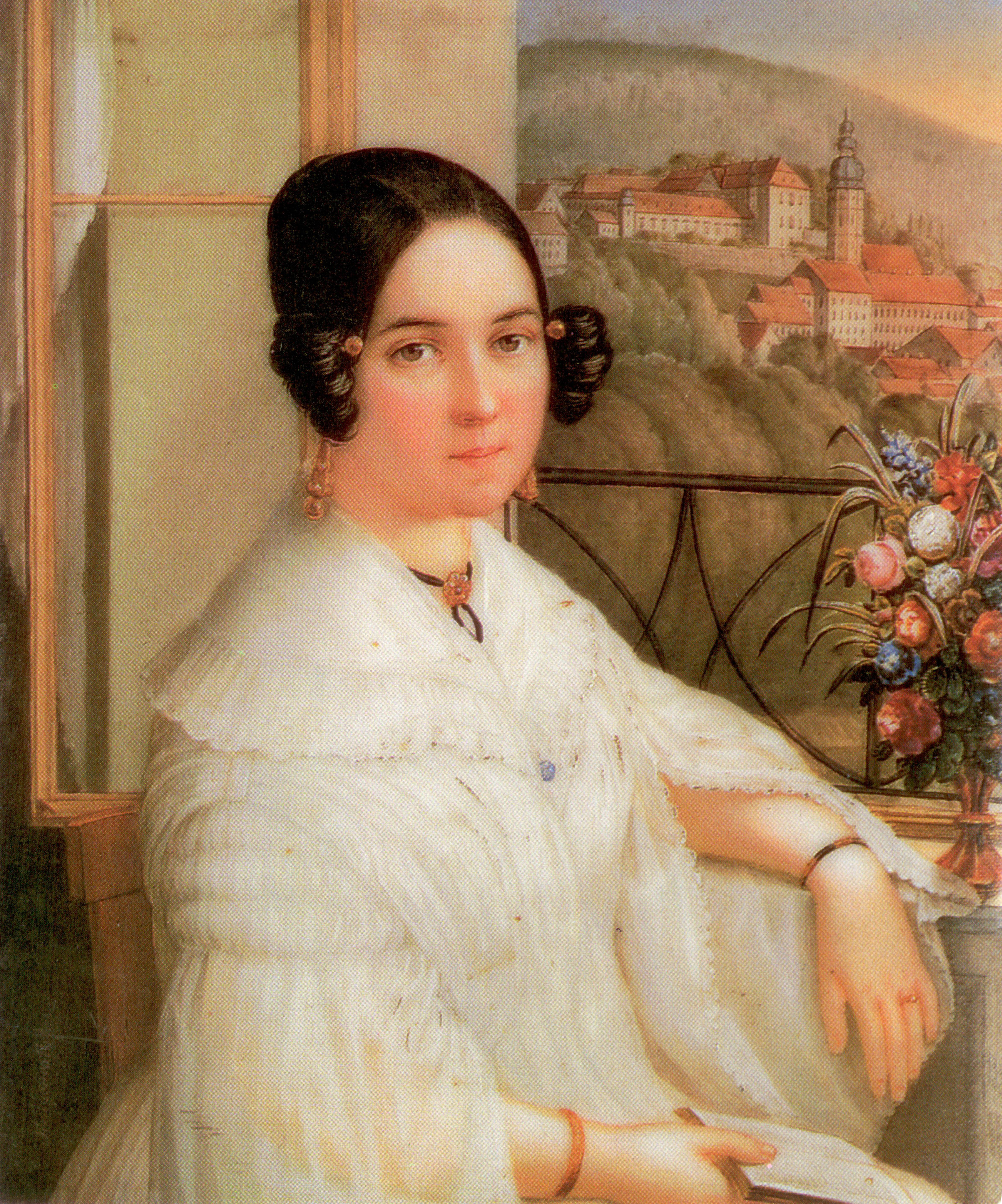 Екатерина Алексеевна Толстая, ур. Хитрово (1805—1853)